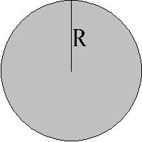 Koło zamachowe wypełnione.